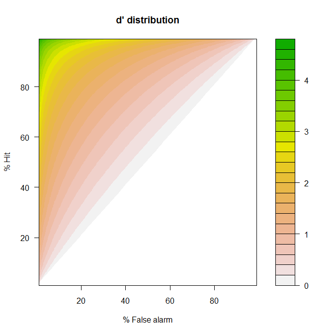 D prime distribution --Gurix 16:06, 15. Mai 2011 (CEST)